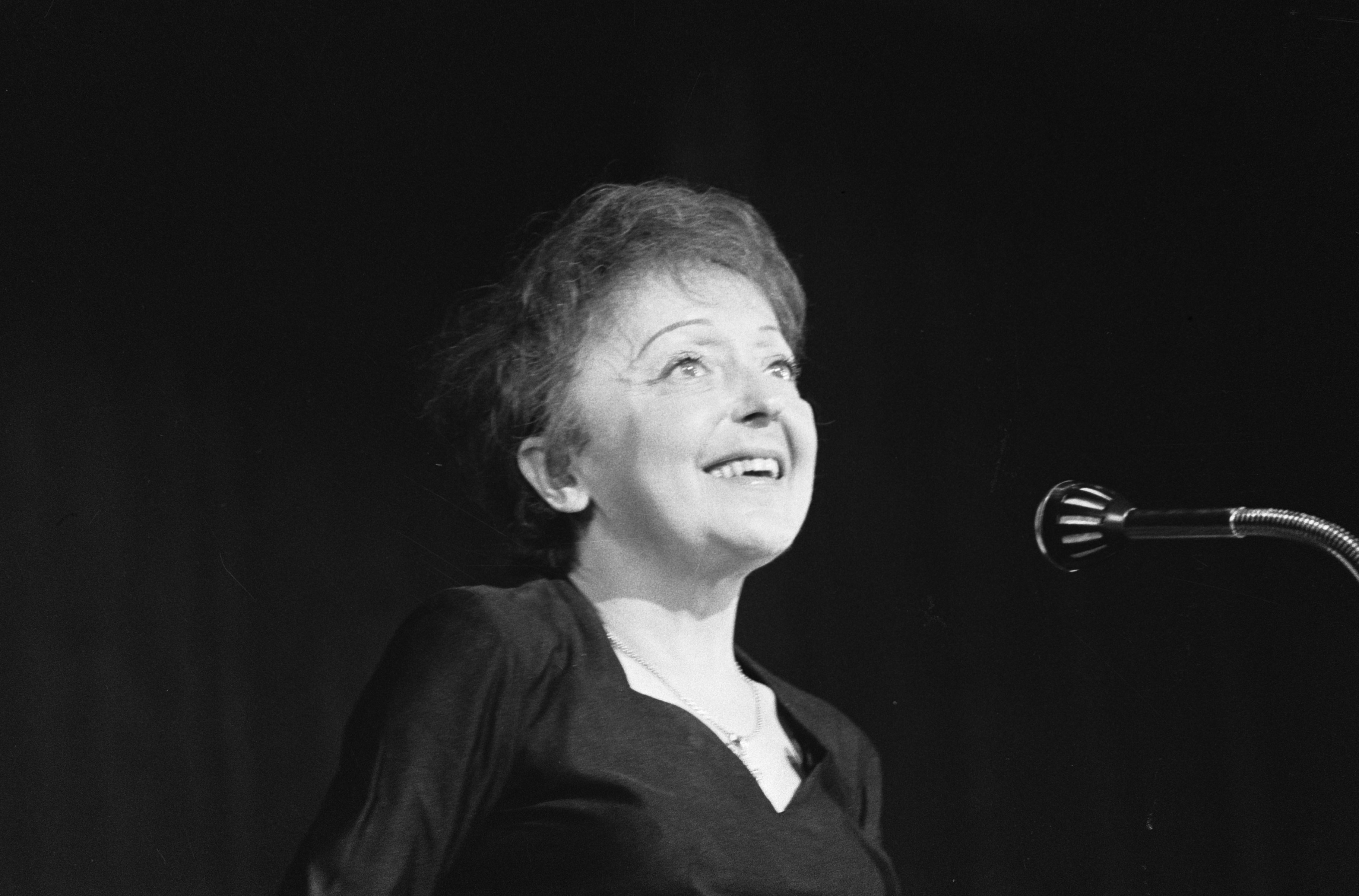 Collectie / Archief : Fotocollectie Anefo Reportage / Serie : [ onbekend ] Beschrijving : Edith Piaf zingt in ons land Datum : 13 december 1962 Locatie : Rotterdam, Zuid-Holland Trefwoorden : muziek, zangeressen Persoonsnaam : Piaf, Edith Fotograaf : Koch, Eric / Anefo Auteursrechthebbende : Nationaal Archief Materiaalsoort : Negatief (zwart/wit) Nummer archiefinventaris : bekijk toegang 2.24.01.05 Bestanddeelnummer : 914-6438